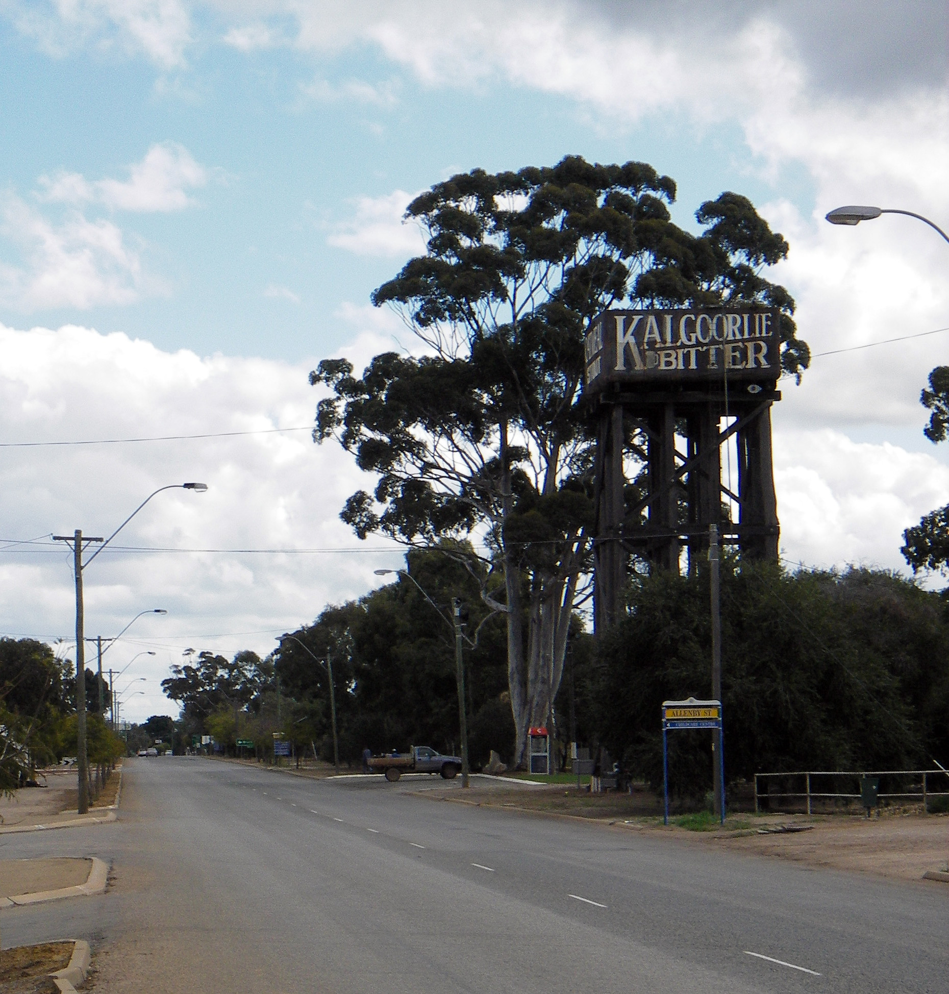 Taken for